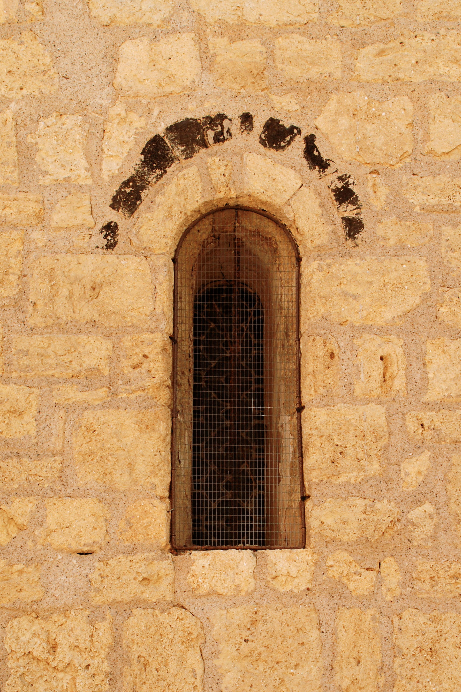 France - Languedoc - Hérault - Lieuran-lès-Béziers - église Saint-Martin